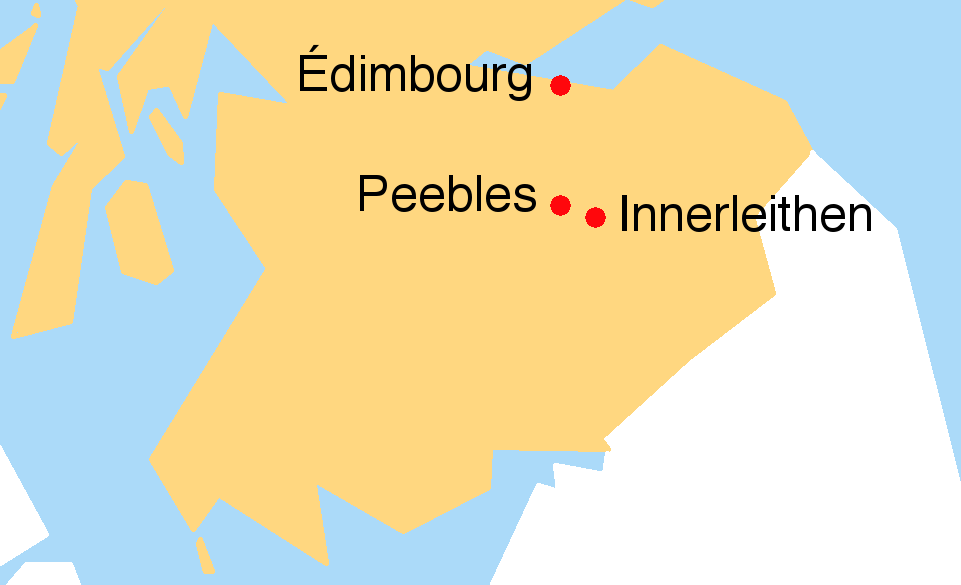 Lieux du roman de Walter Scott, Les Eaux de Saint-Ronan. Selon la tradition, le « Saint-Ronan » du livre serait Innerleithen. Et « Machtorn », la principale ville du comté, que Scott situe à 14 miles de Saint-Ronan, pourrait être Peebles.